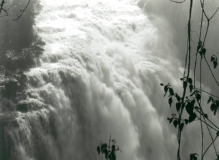 Victoria Falls